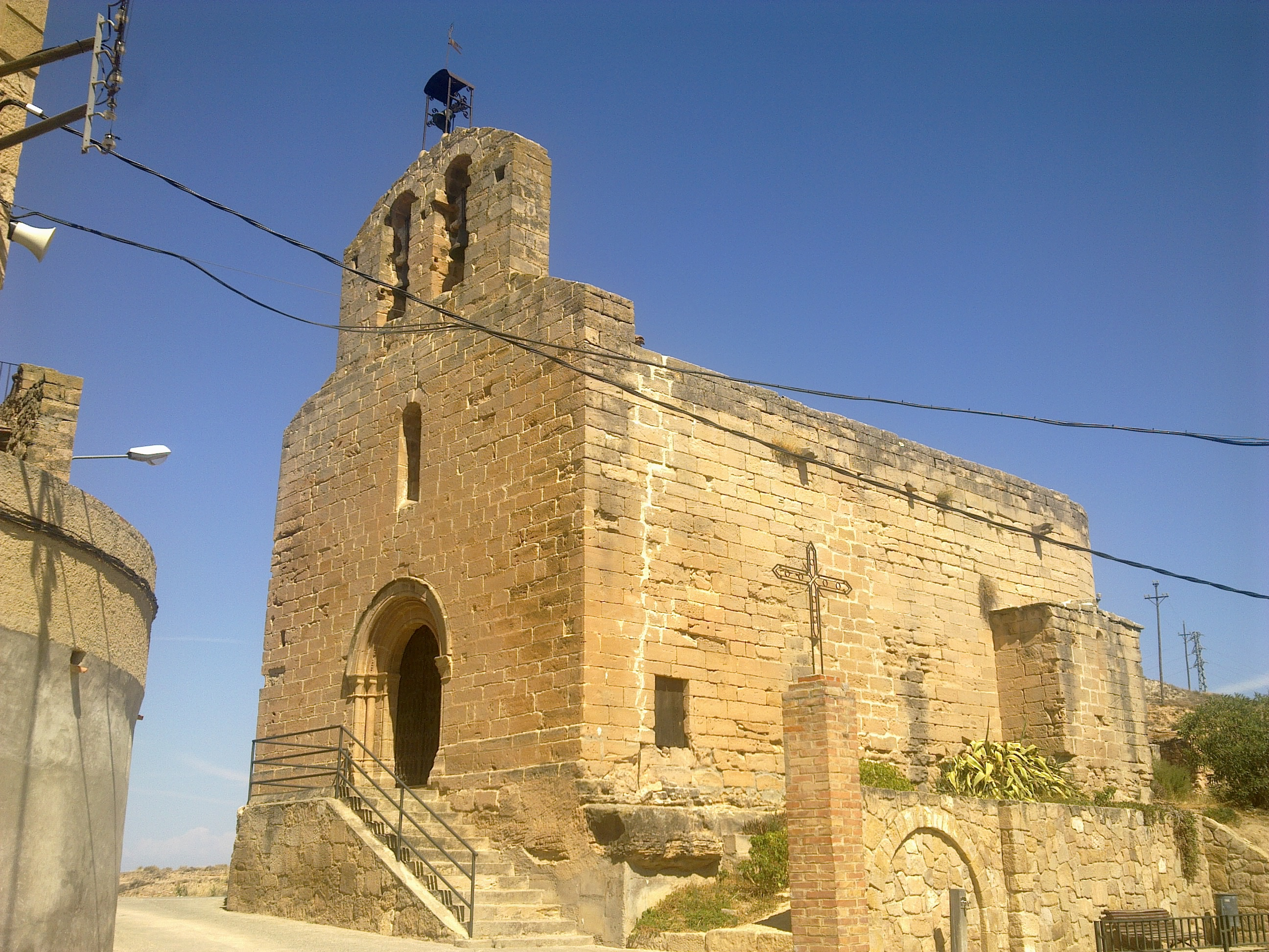 Romànic segle XII